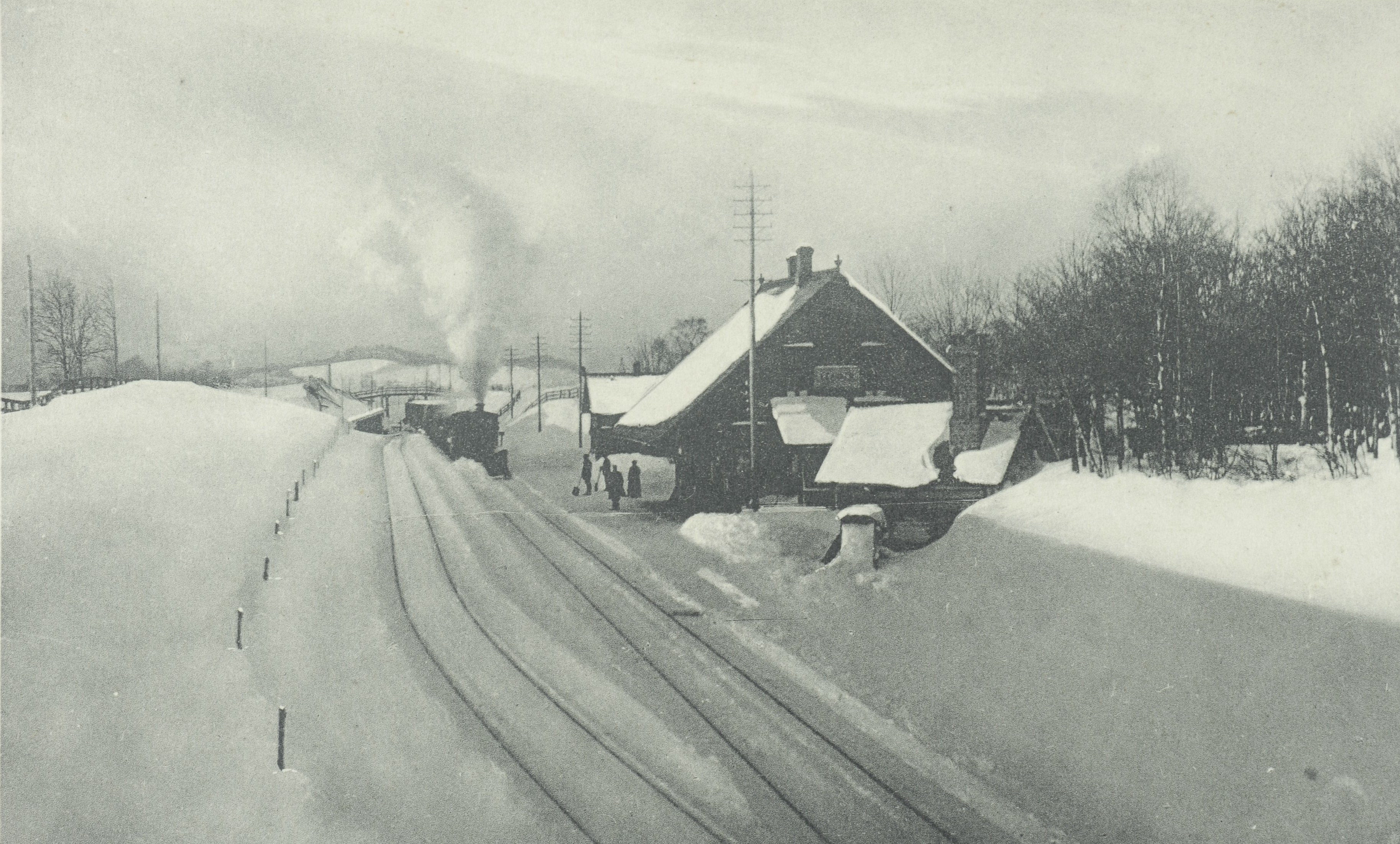 Den gamle stasjonsbygningen på Leangen stasjon i Trondheim